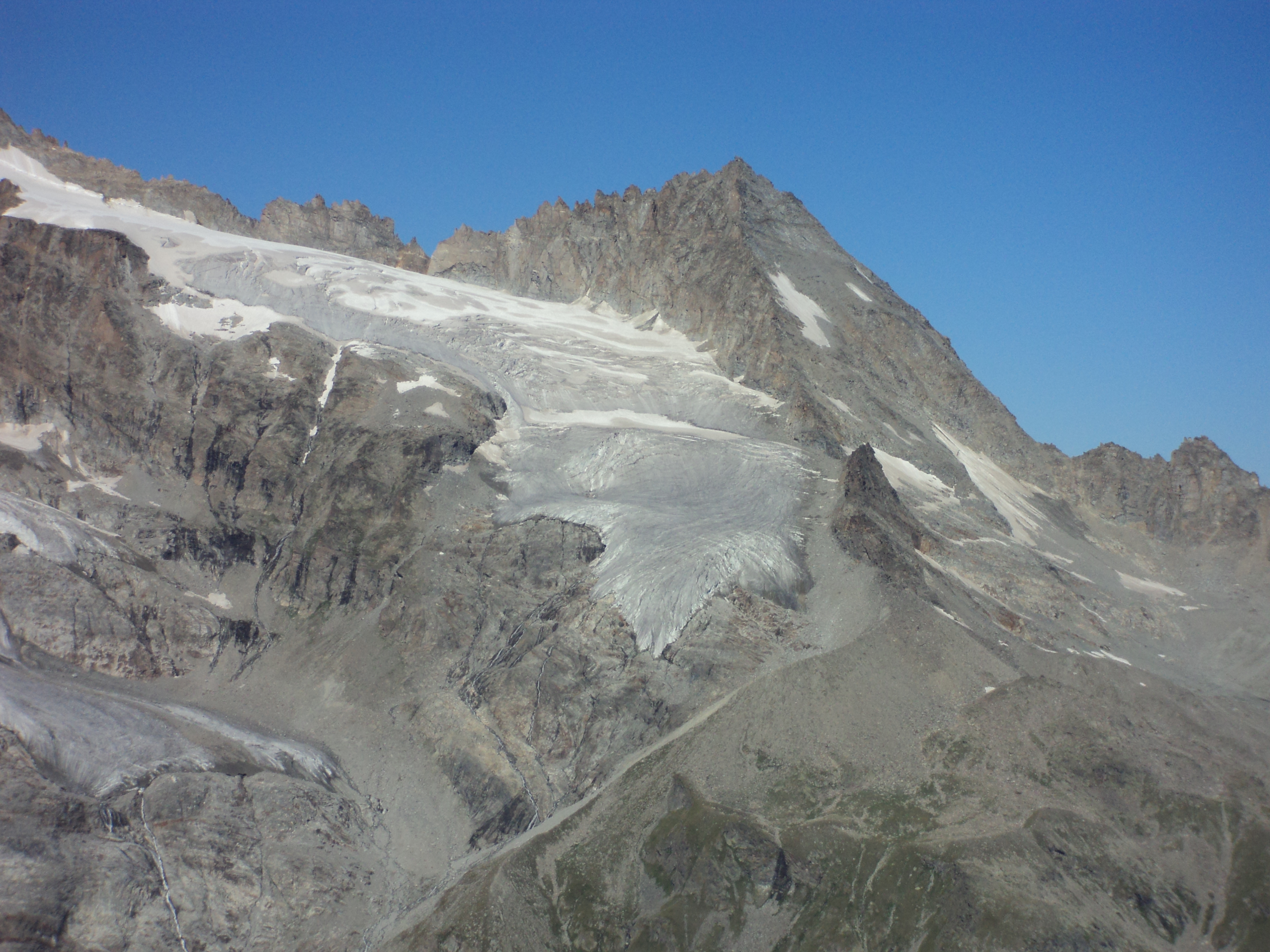 L'Herbetet visto salendo al Bivacco del Money. Sul fianco si appoggia il Ghiacciaio del Tzasset